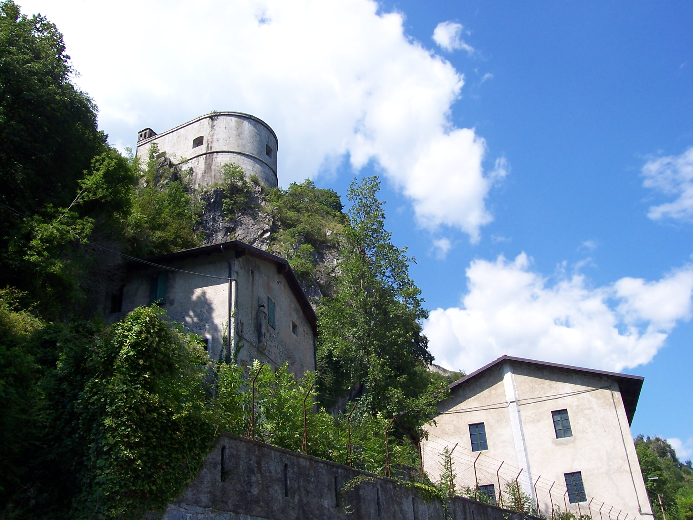 Cadria fotografia Rocca d'Anfo pubblico dominio